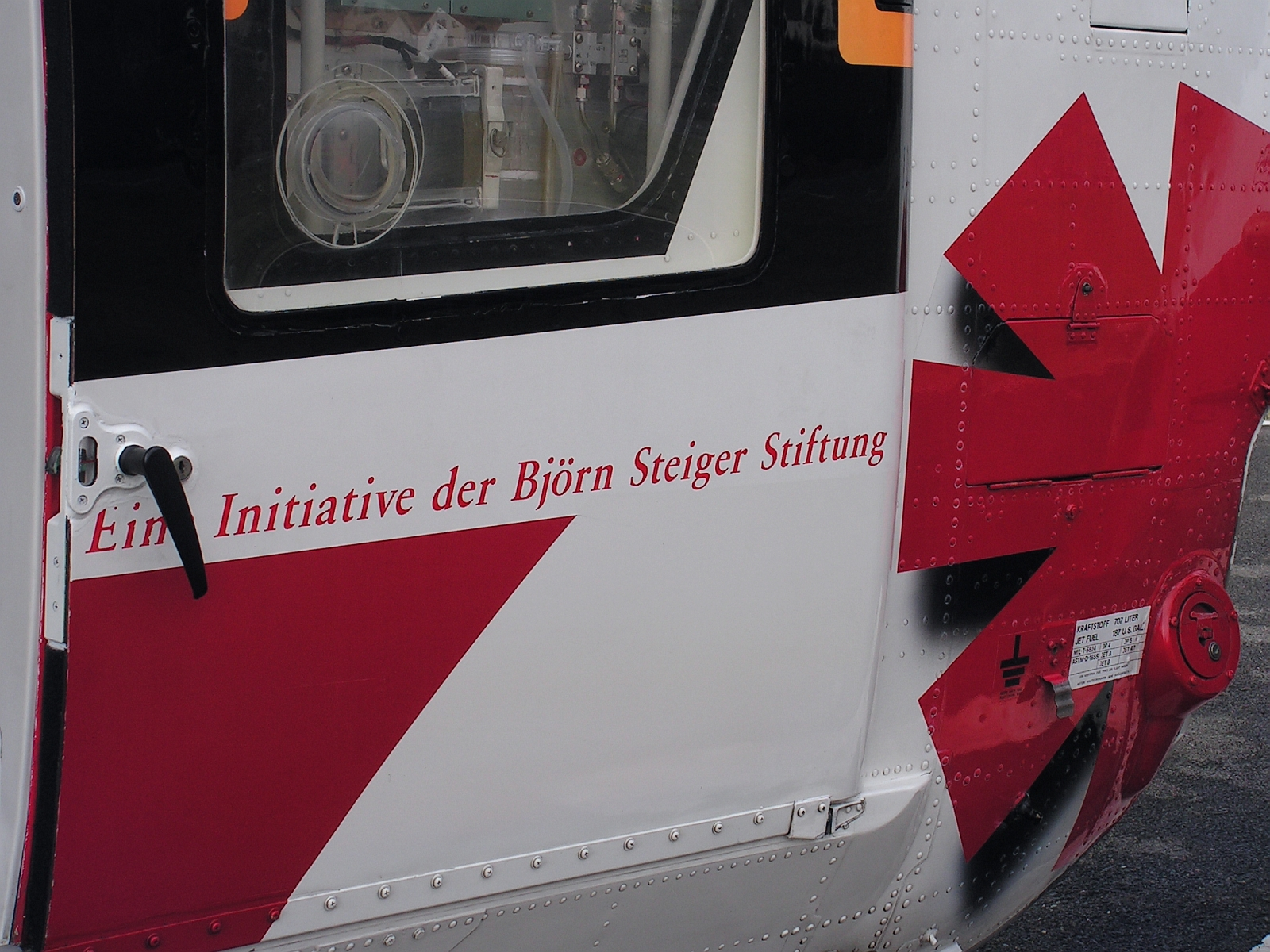 Initiative der Björn Steiger Stiftung - Foto 2005 Wolfgang Pehlemann Wiesbaden PICT0009.jpg